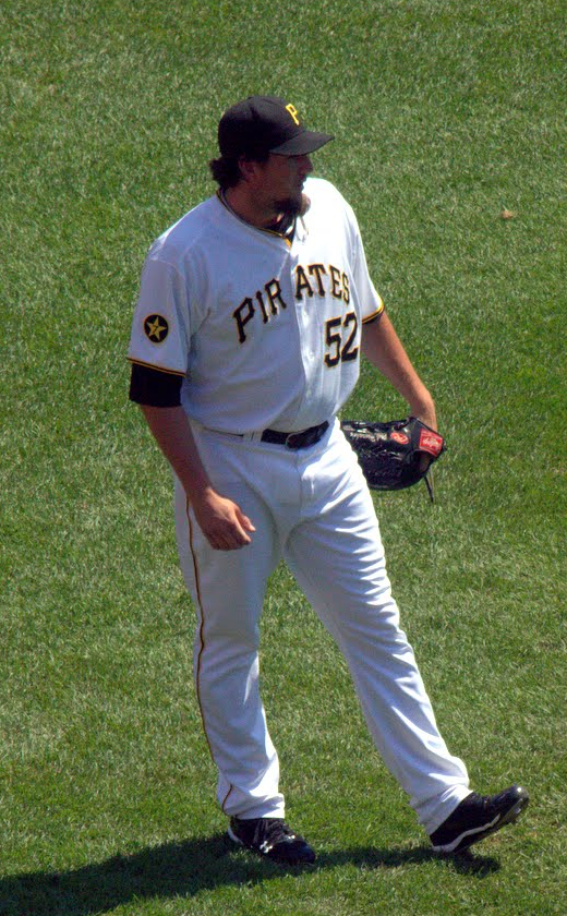 Joel Hanrahan